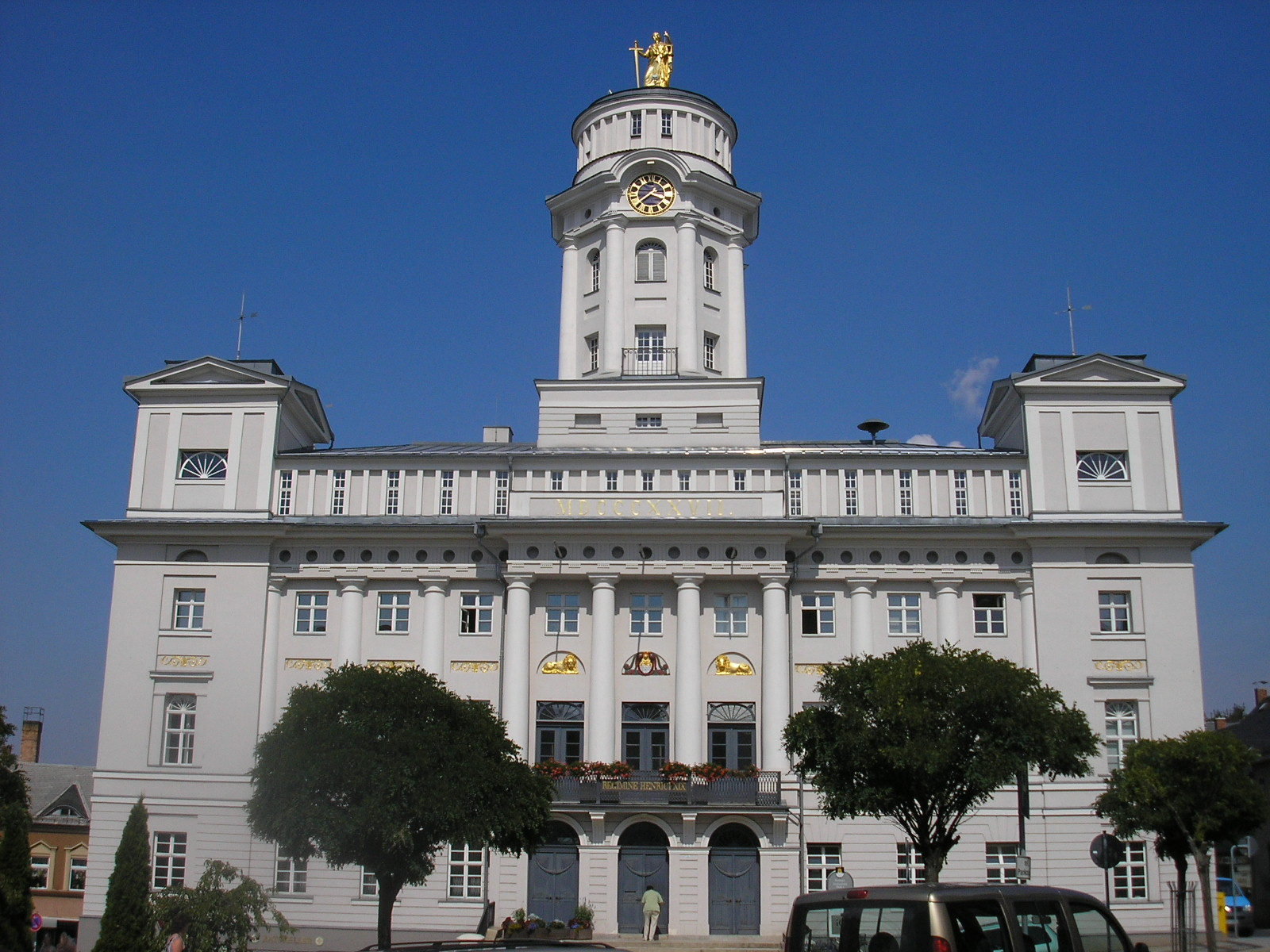 Das Rathaus von Zeulenroda (Thüringen).